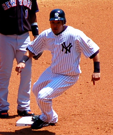 Melky Cabrera